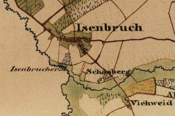 Preußische Kartenaufnahme 1846 - Uraufnahme